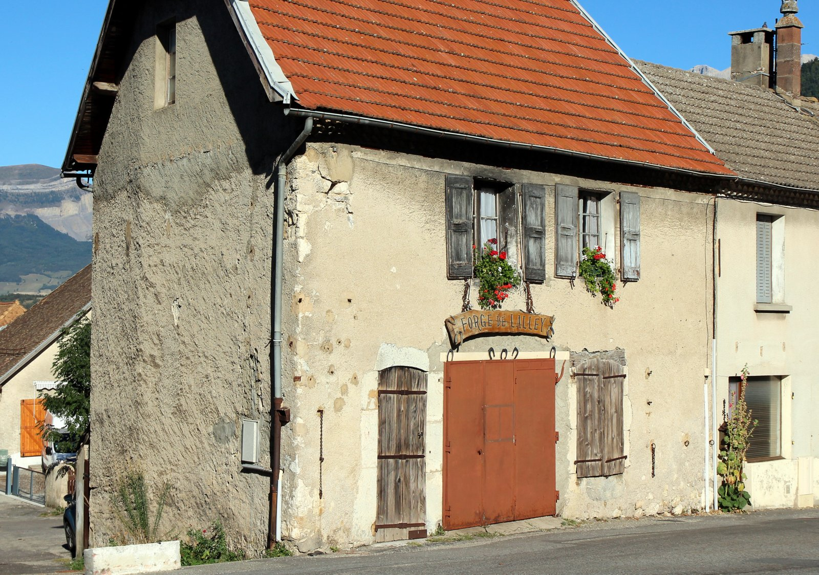 Forge artisanale Mise en fonction en 1836, en activité jusqu'en 1976. Inscrit Monument Historique partiellement le 30 juin 1995